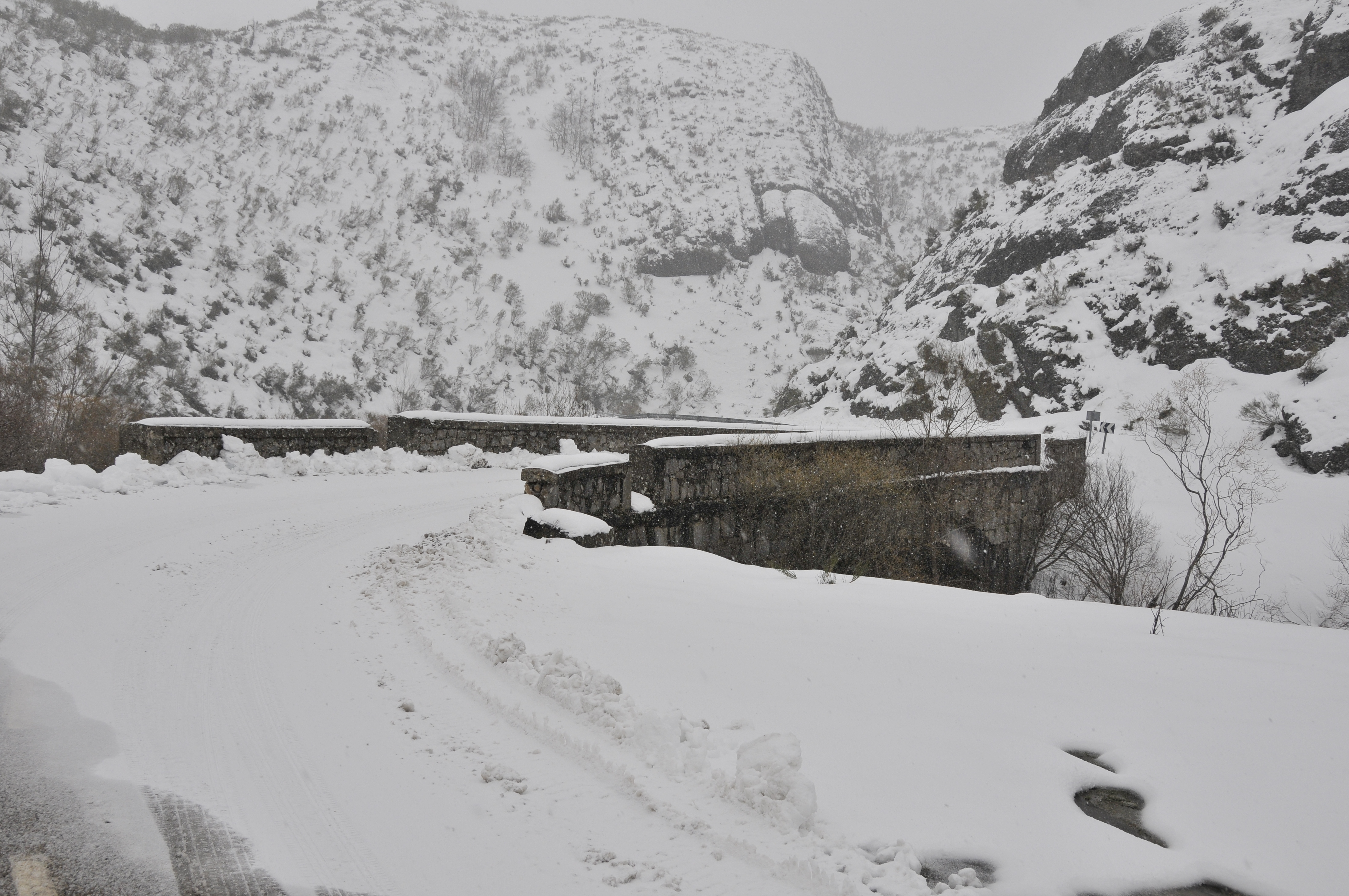 CARRETERA A PANDETRAVE CON MUCHA NIEVE